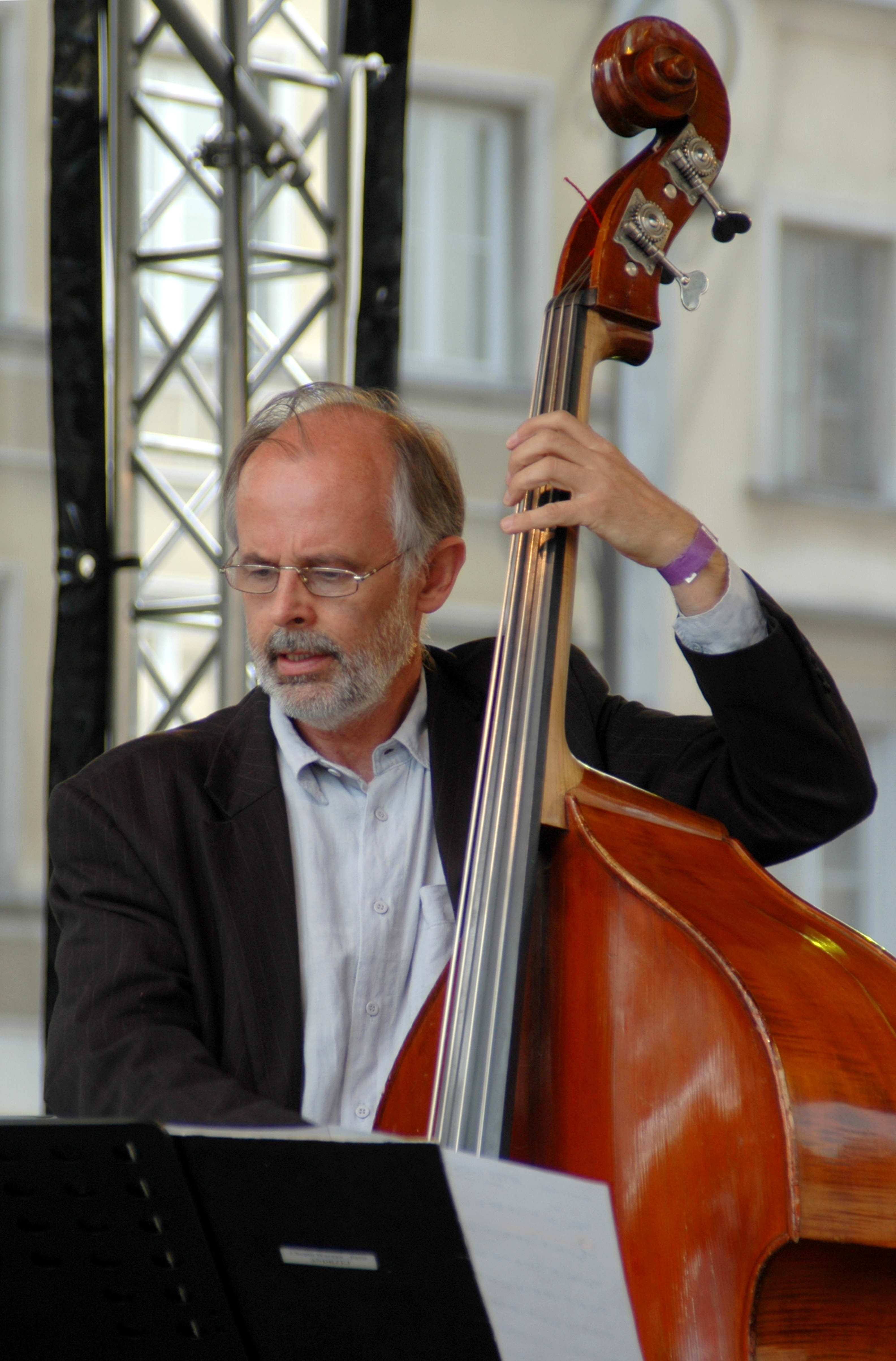 Andrzej Łukasik podczas koncertu "Chopin na Krakowskim Przedmieściu" we wrześniu 2011 w Warszawie.